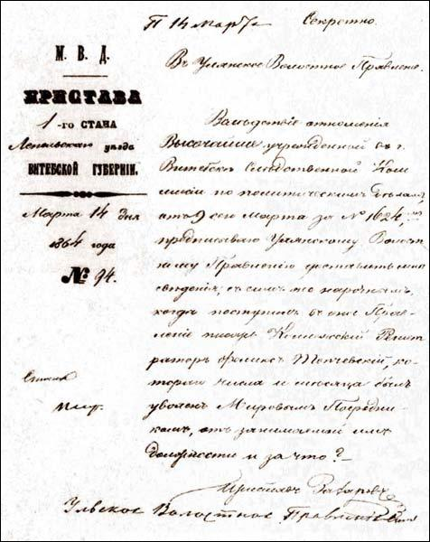 Ліст запыту ў Вульскае валасное праўленне